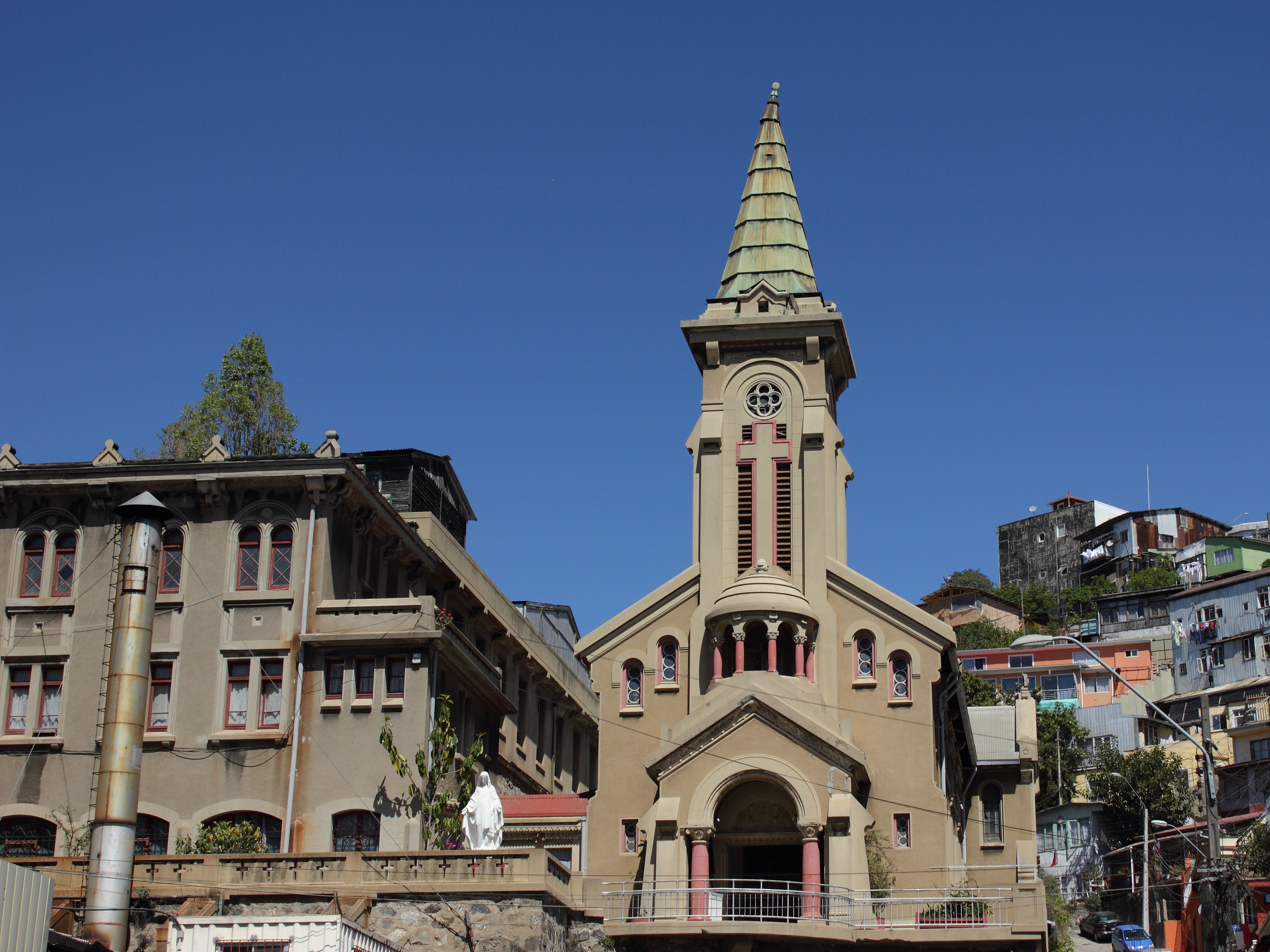 Capilla del Carmen This is a photo of a national monument in Chile: 584